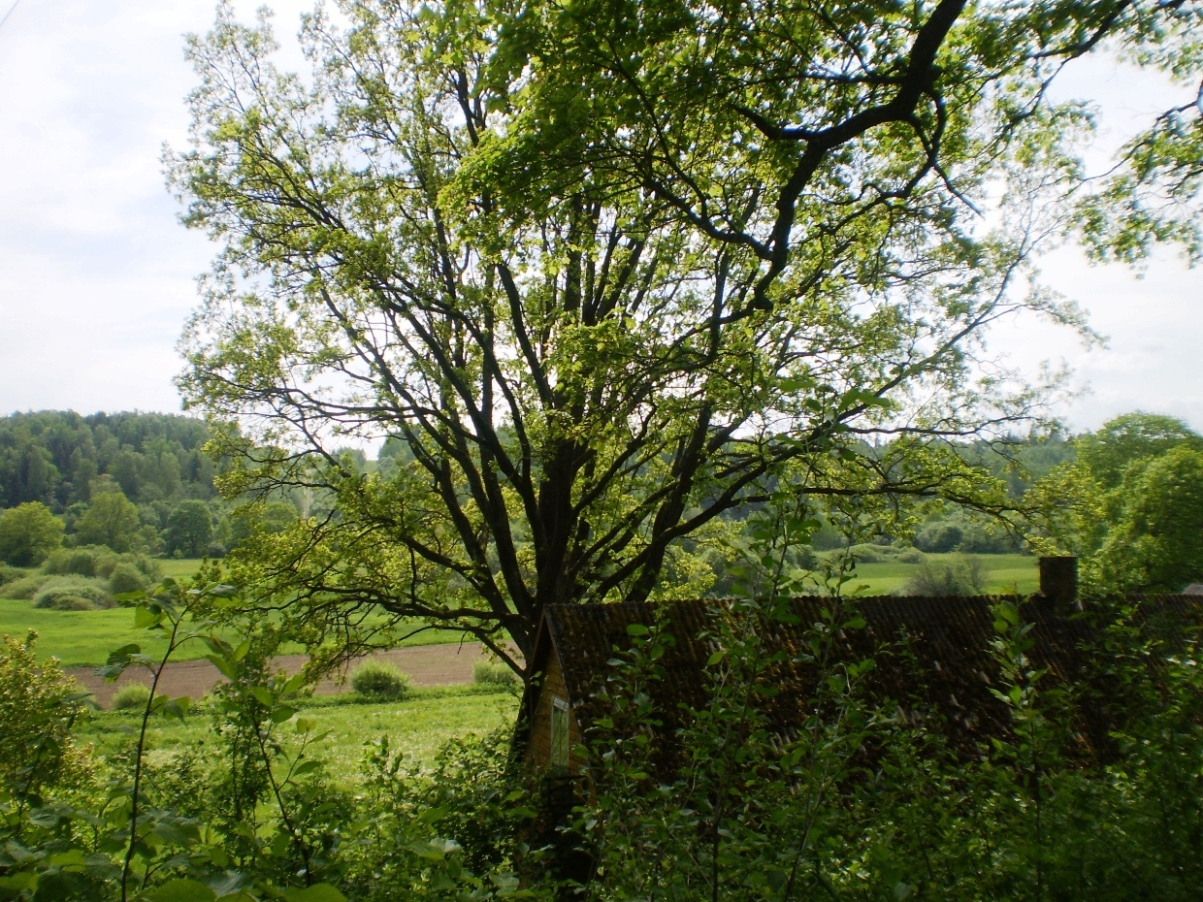 Ugionys, Raseinių raj.